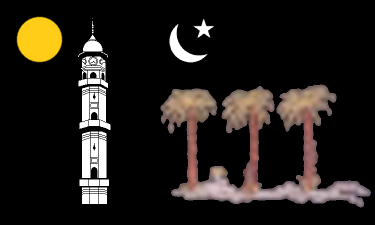 Flagge der Lajna Imaullah